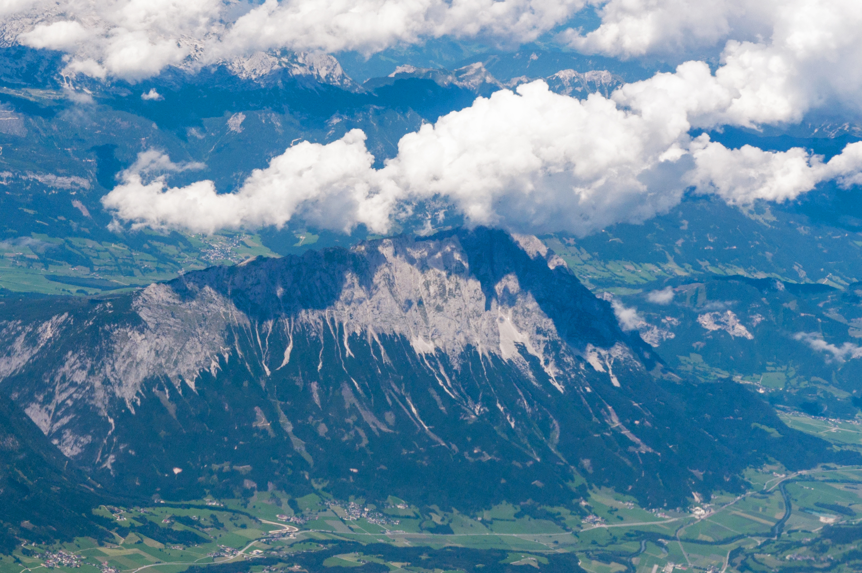 Austria, aerial impressions between Belgrade and Munich. Der Grimming von Süden